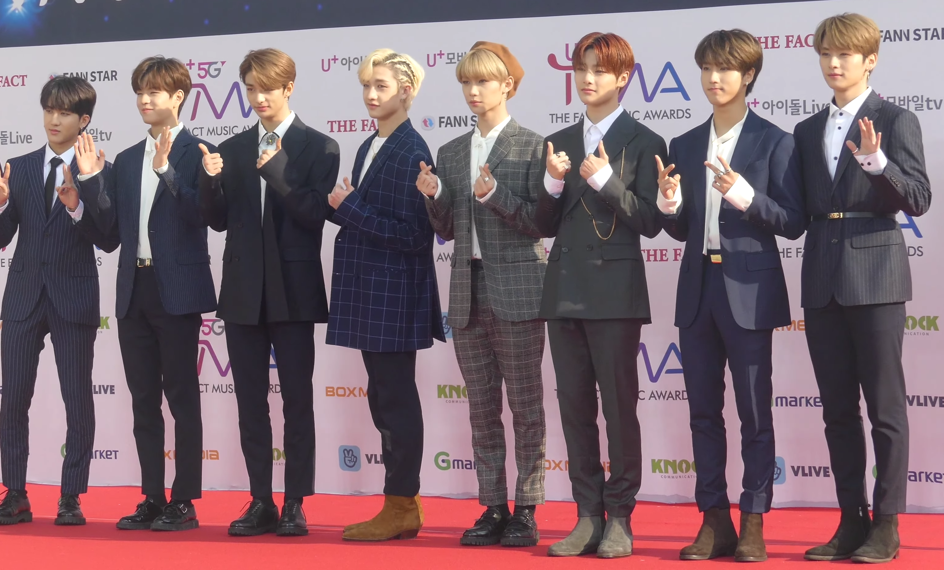 Stray Kids於2019年4月24日在The Fact Music Awards頒獎典禮